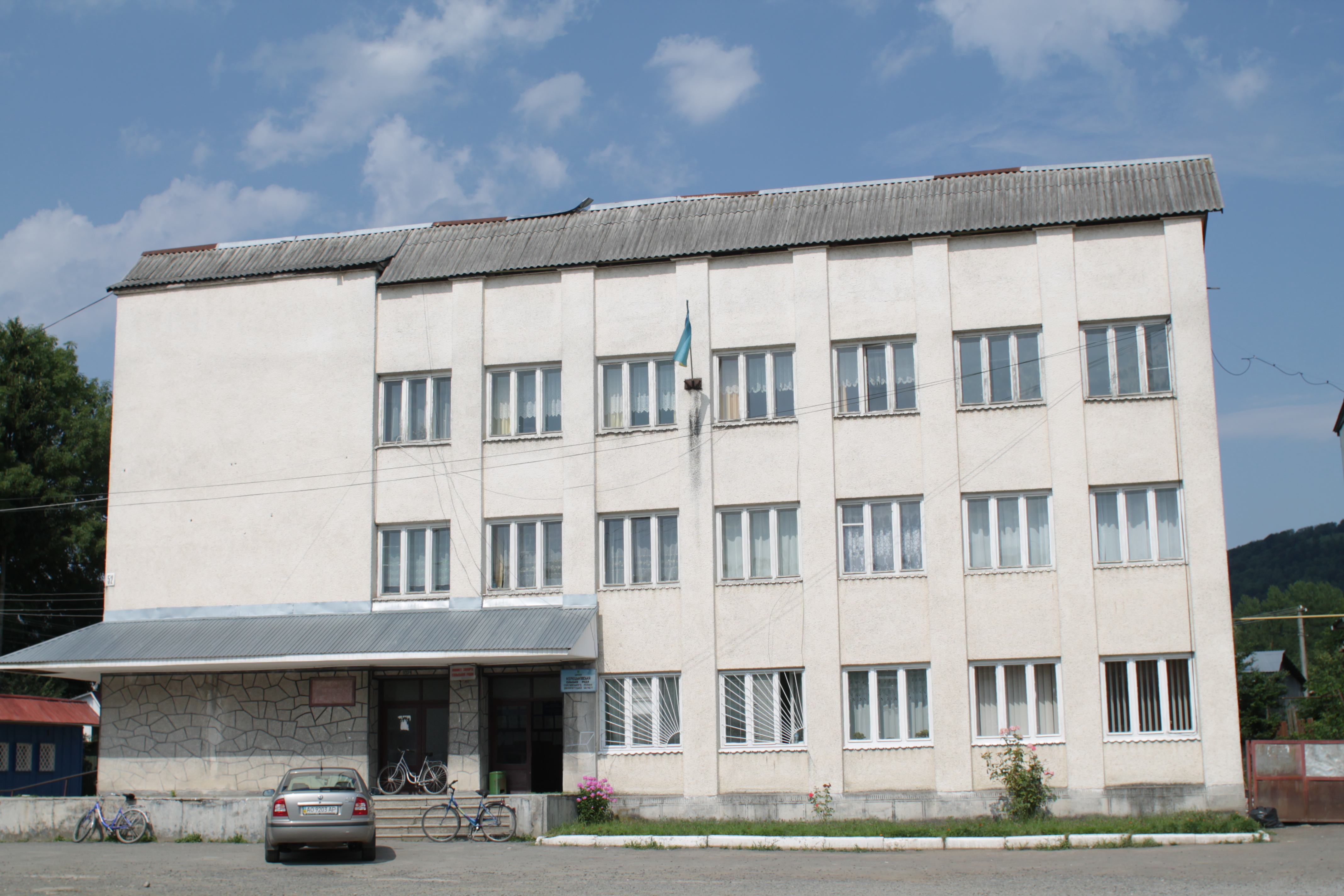 Керецьківська сільська рада Свалявського району Закарпатської області, 1